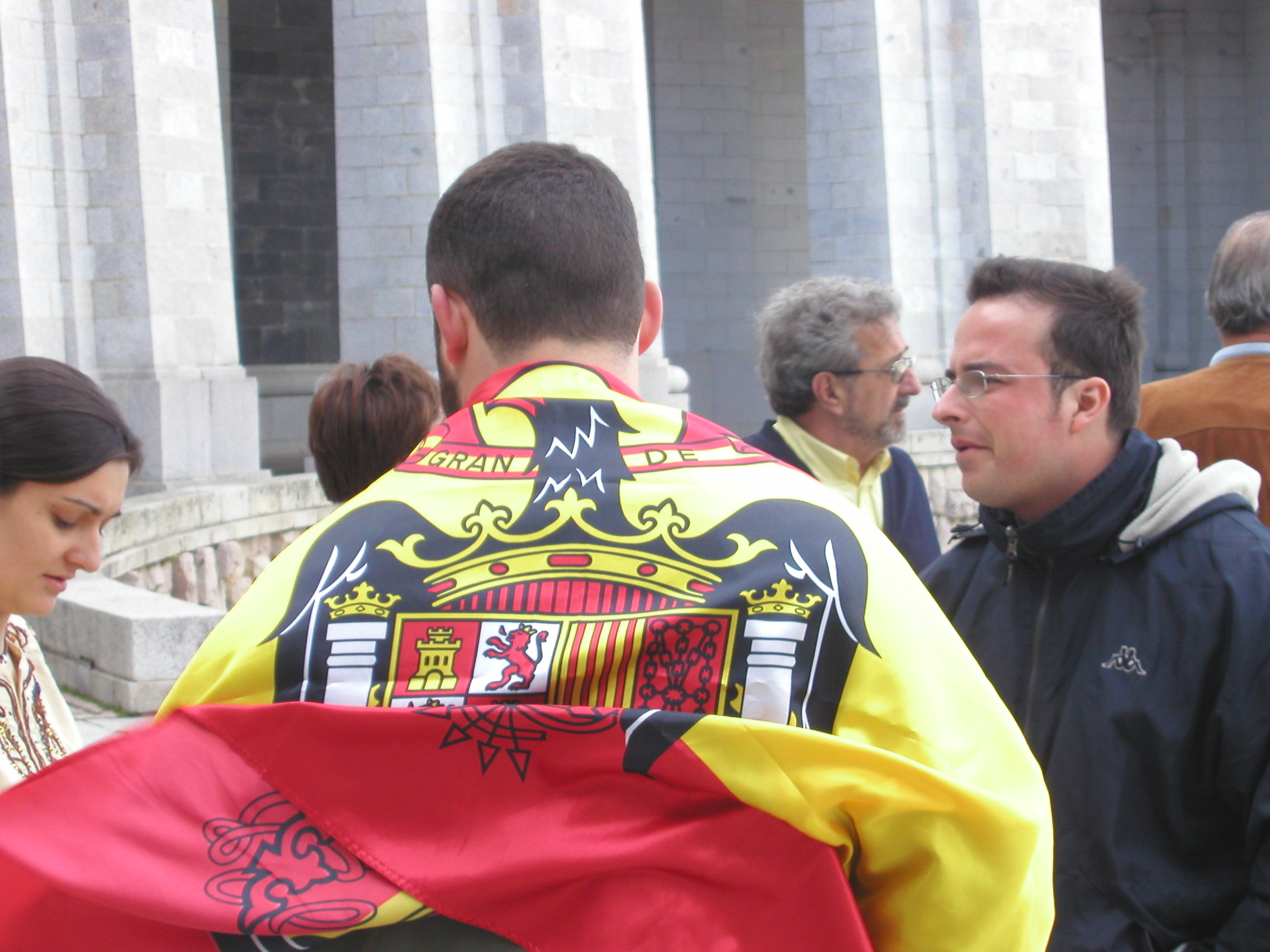 El Valle de Los Caidos, Spain, visitors sporting a flag of Spain under Francisco Franco